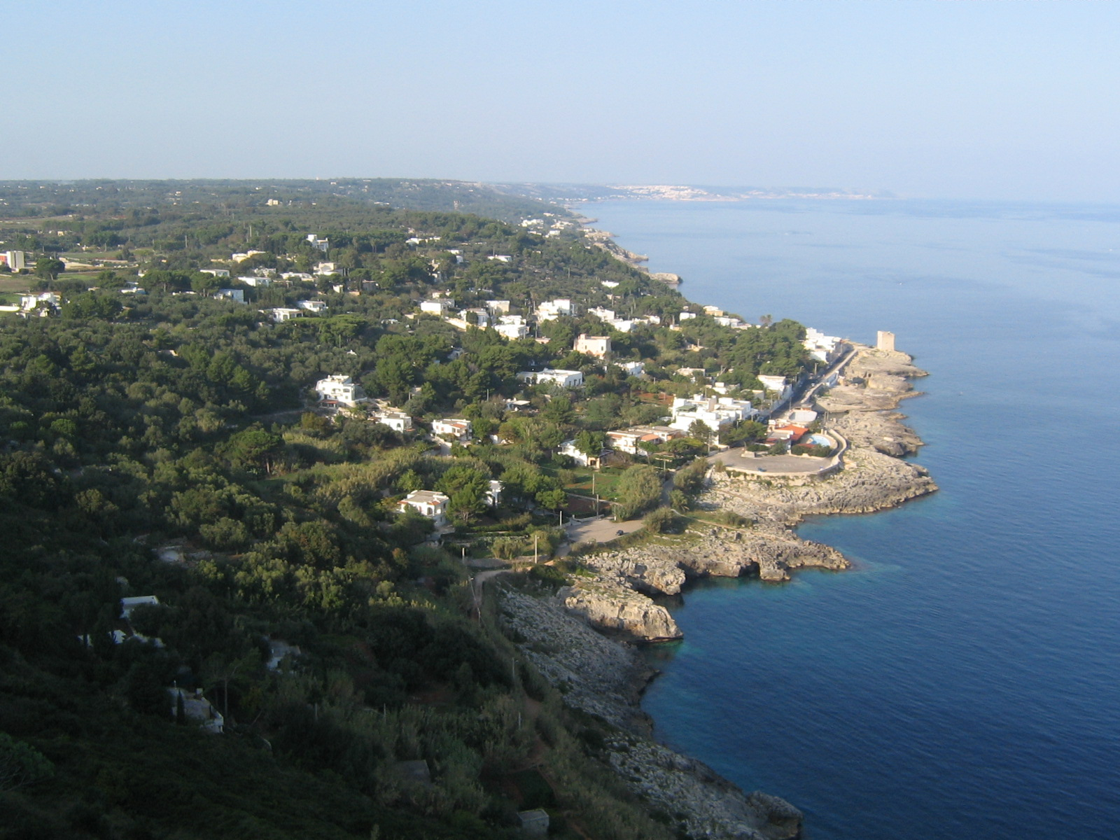 Marina Serra, frazione del comune di Tricase.